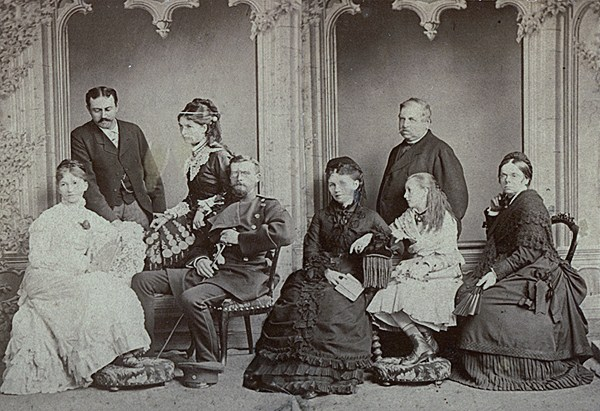 Барон Андрей Иванович Дельвиг и его родственники